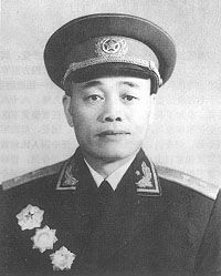 冼恒汉中将1955年授衔照